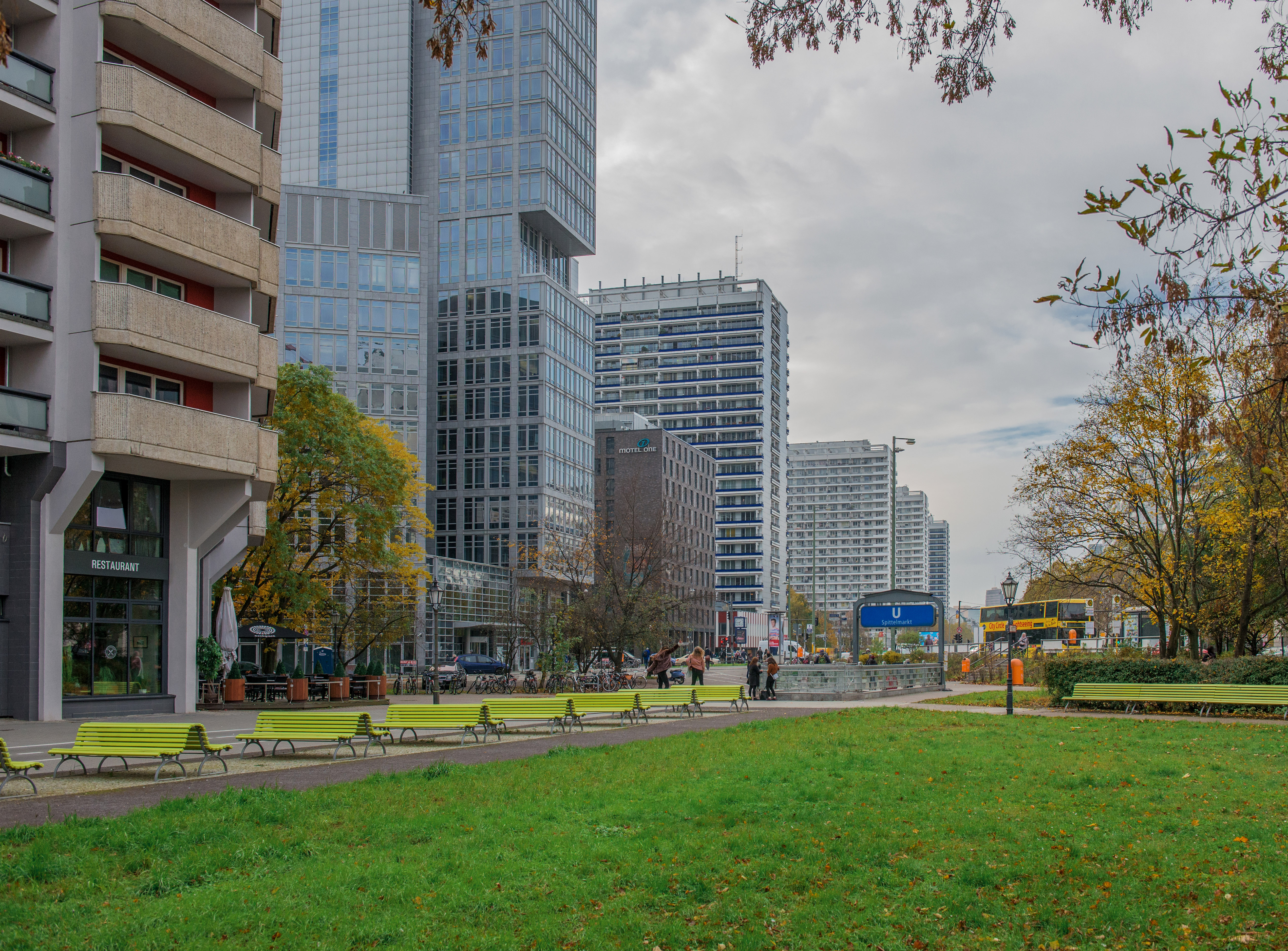 Spittelmarkt, Spitteleck, Ostdeutscher Sparkassenverband, Motel One, Komplex Leipziger Straße im Hintergrund